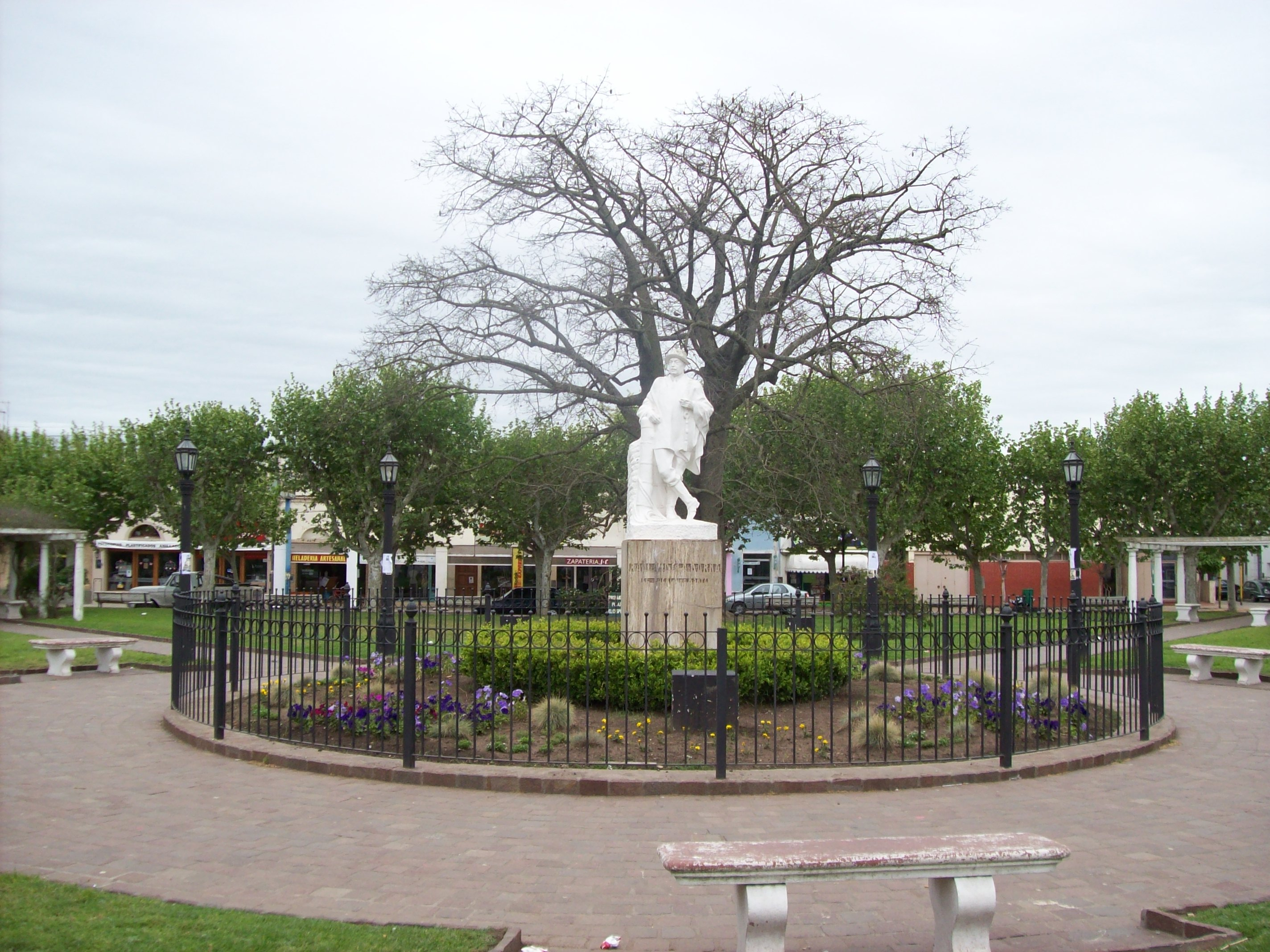 Monumento a Raúl Videla Dorna en el centro de la Plaza Adolfo Alsina en San Miguel del Monte, Provincia de Buenos Aires, Argentina.